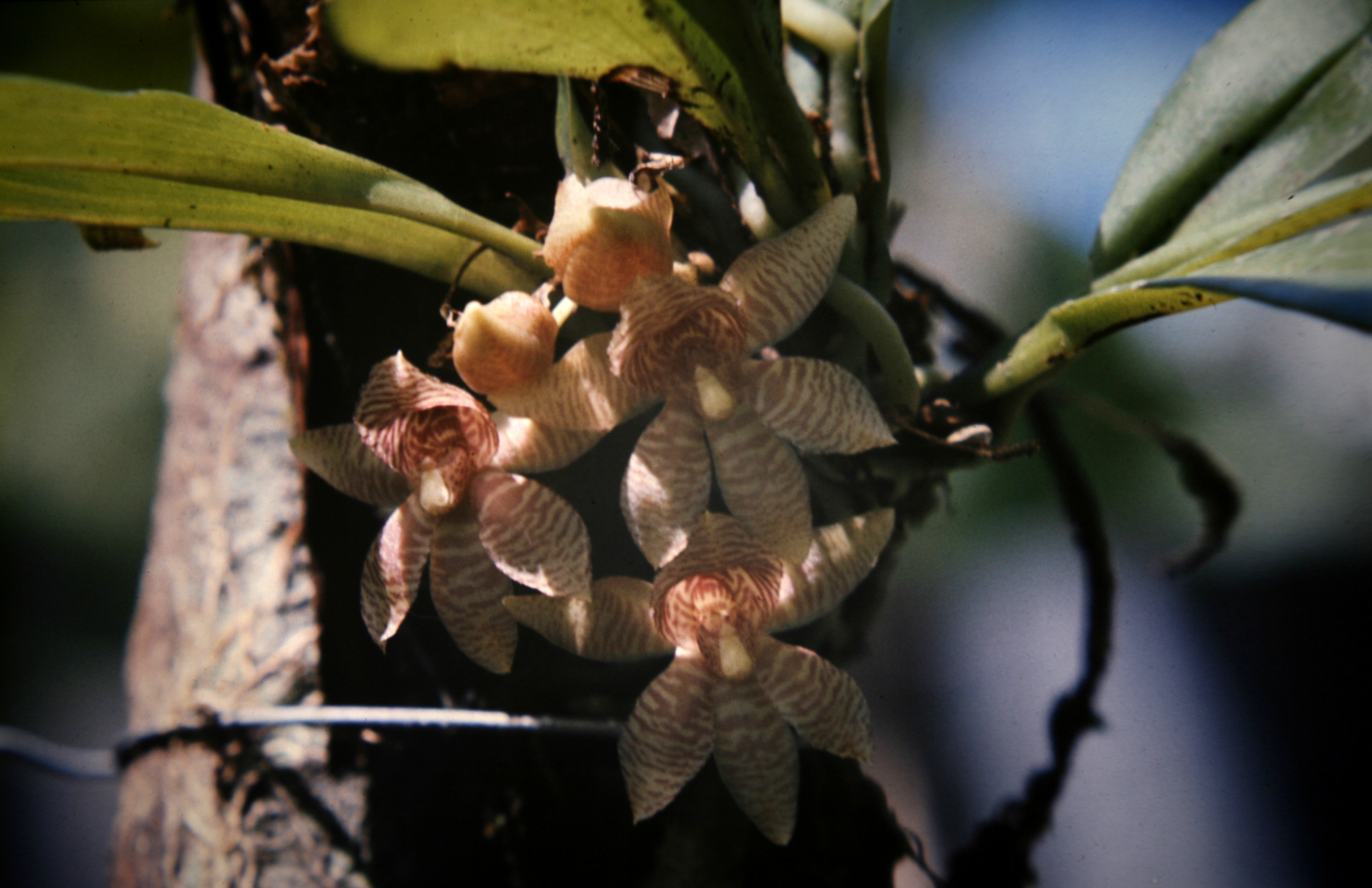 Chaubardiella tigrina. Found in Suriname, 1972-1982.